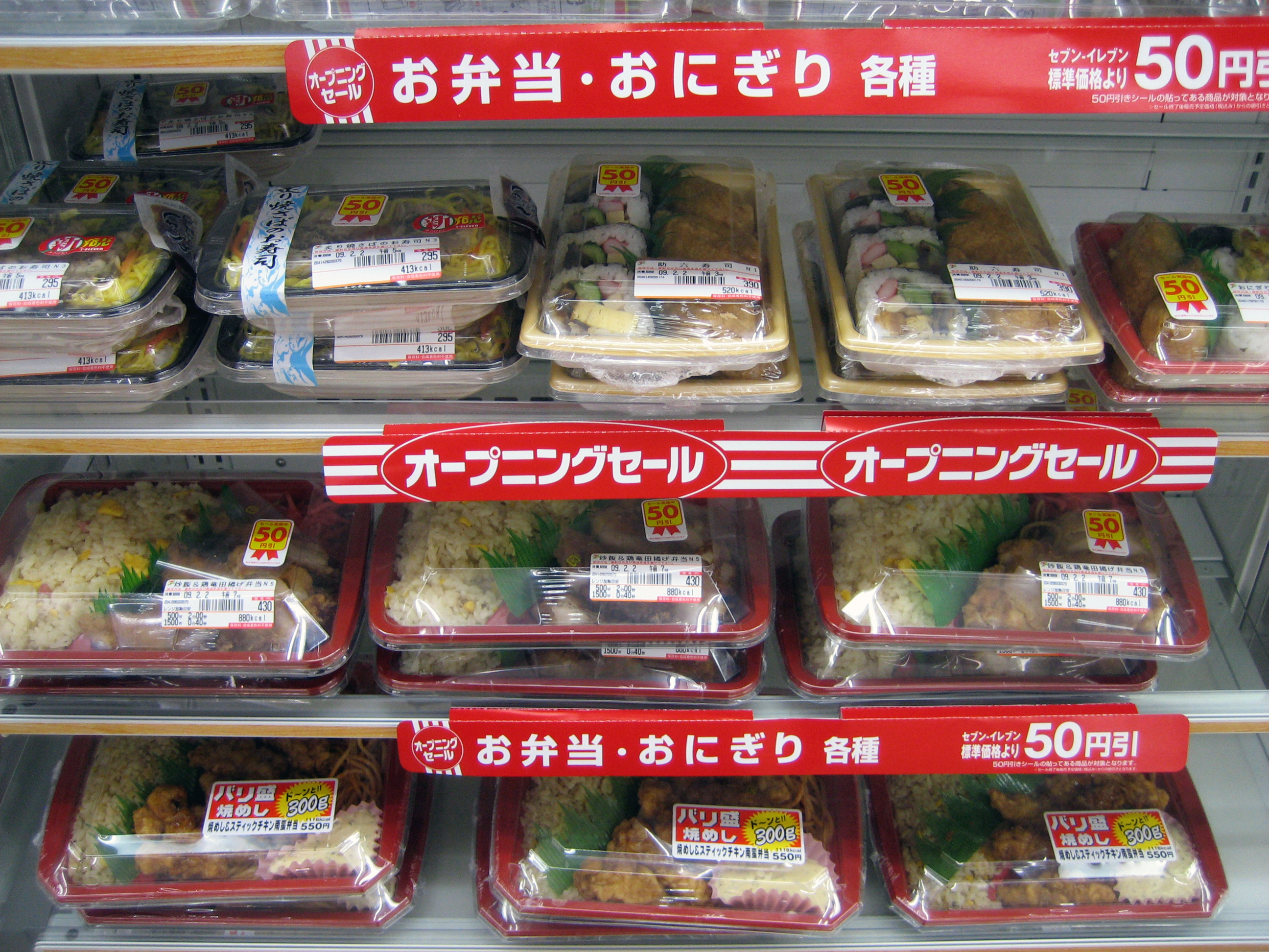 日本のコンビニエンスストアチェーンのセブンイレブンで販売されている弁当。